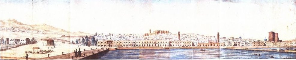 Акварель Карла Густава Гиппиуса "Баку"